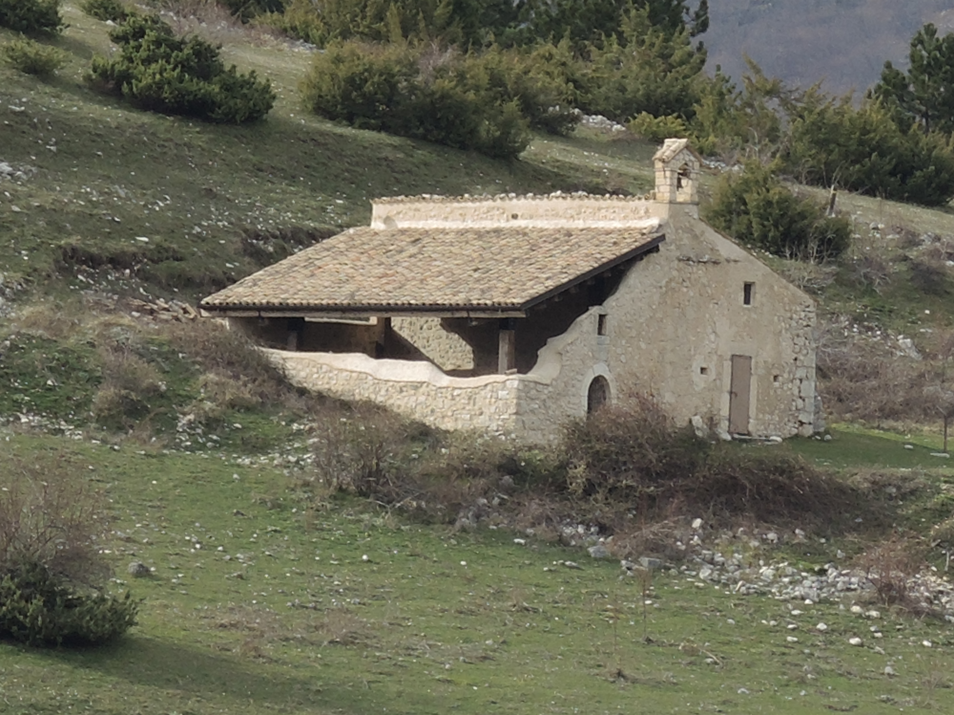 Eremo di San Germano di Pacentro